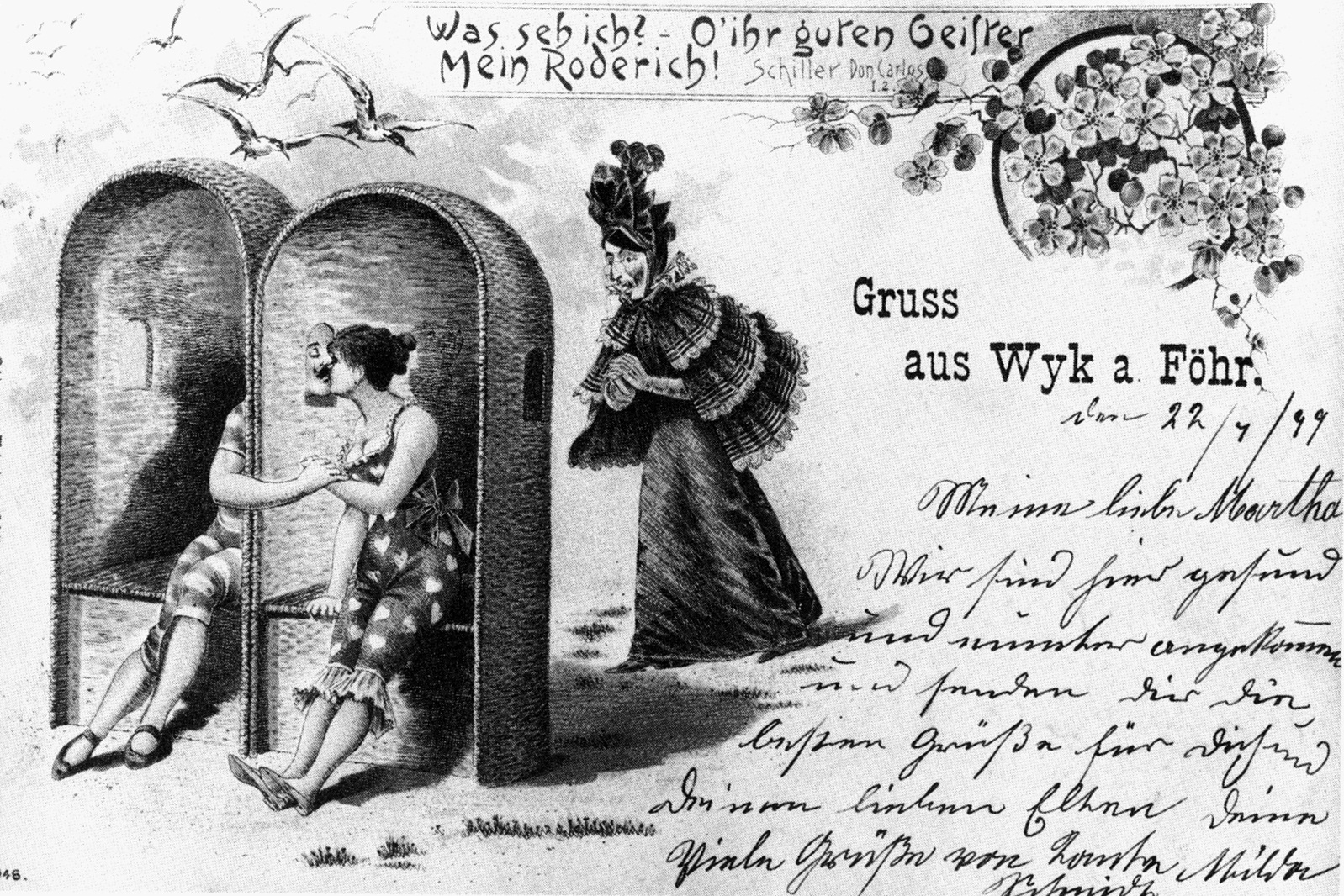 begegnung im strandkorb